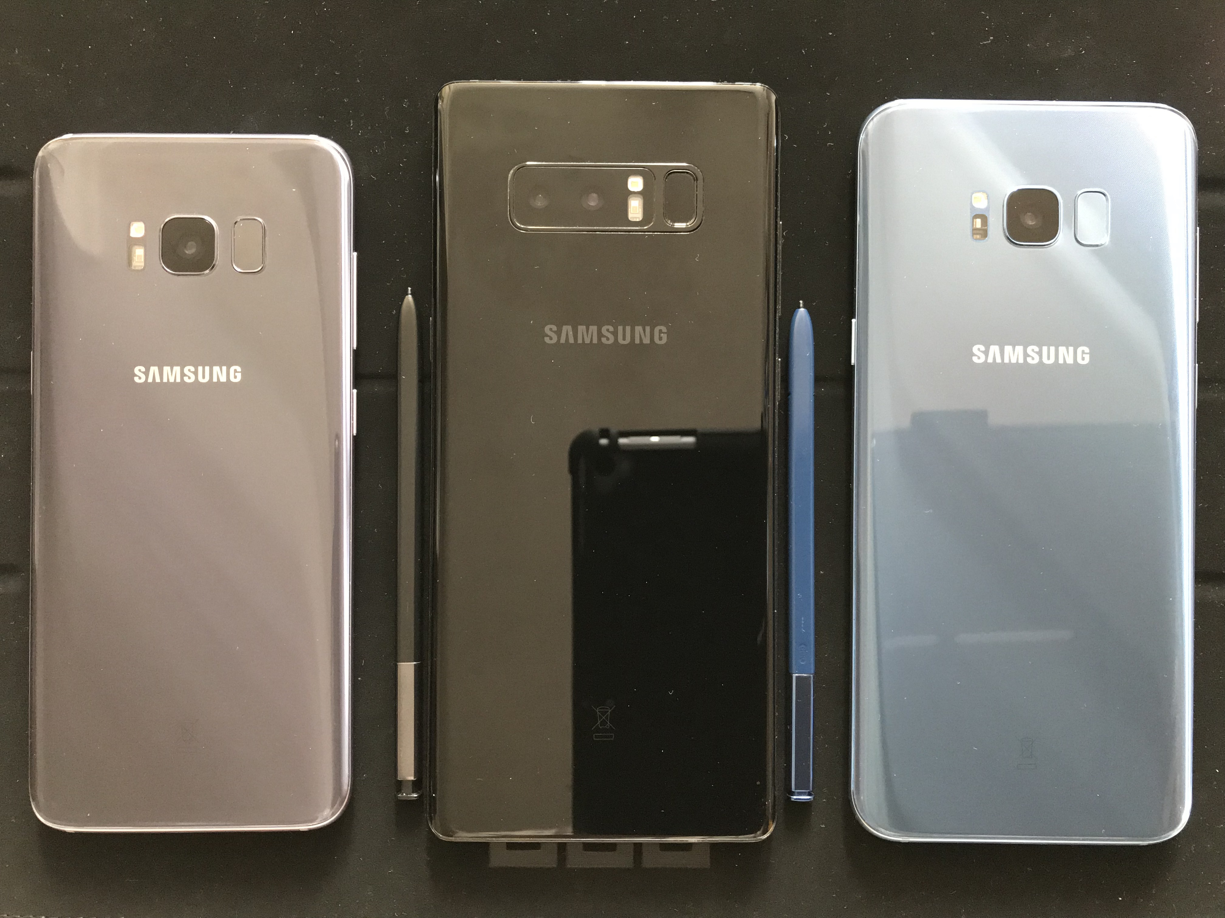 Smartphone Samsung Galaxy